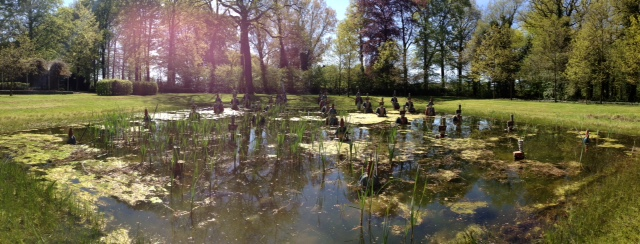 De soldaten van Napoleon in het voormalige Land van Ooit